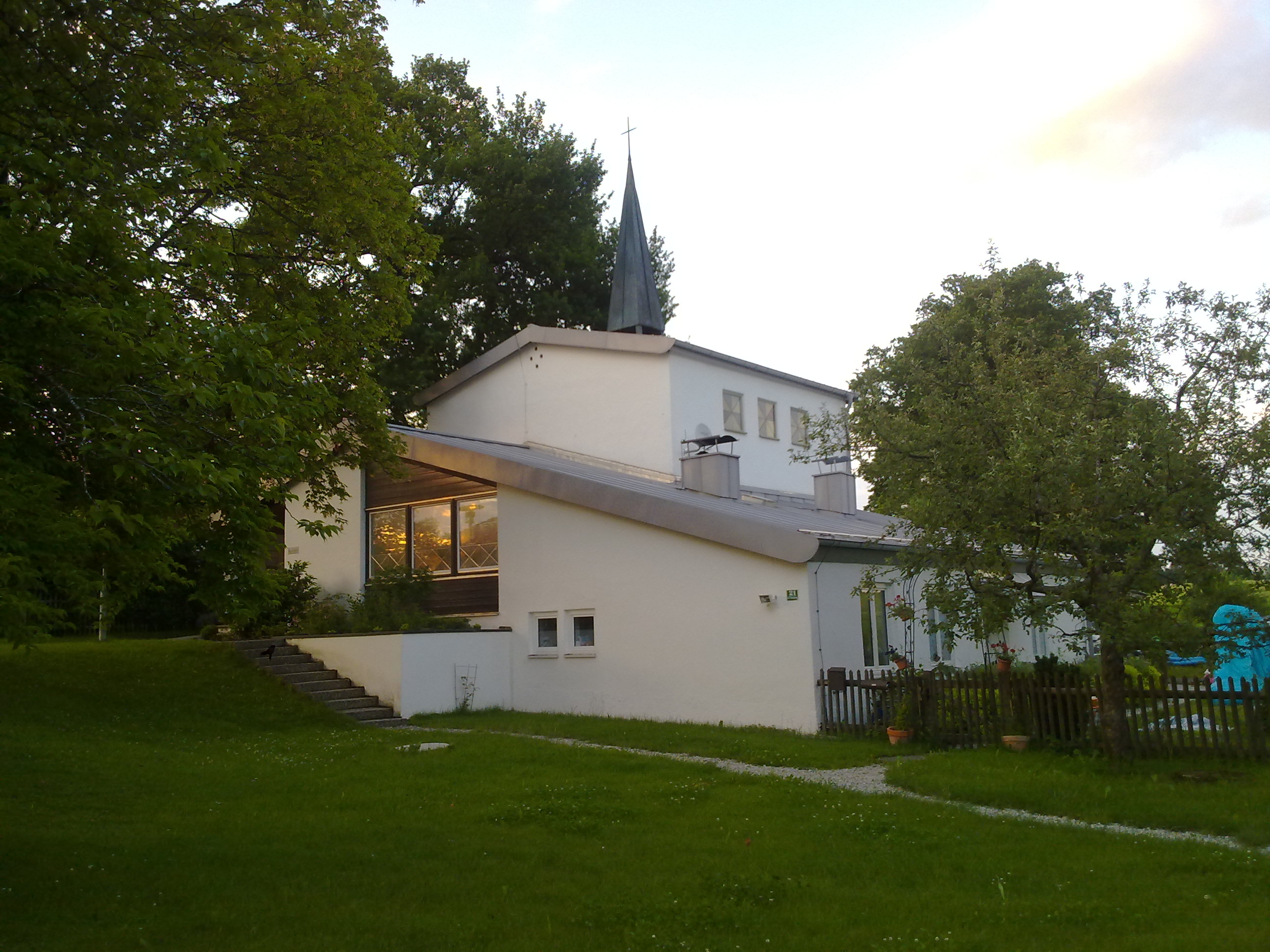 Kirche in Dietramszell, erbaut 1961 durch Architekt Dipl.-Ing. Franz Lichtblau